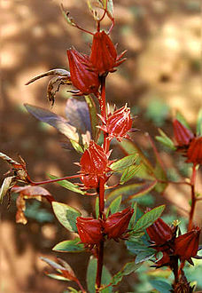 نوع من انواع النبات الاقتصادي ويسمى الكركدية